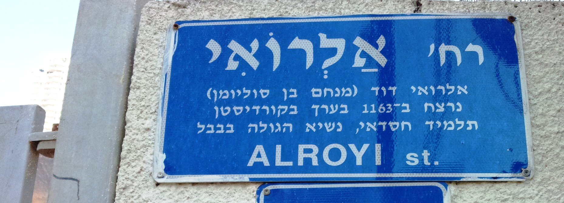 שלט רחוב אלרואי בשכונת נווה צדק בתל אביב